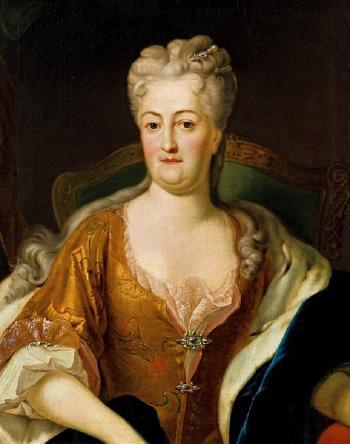 Christiane Eberhardine von Brandenburg-Bayreuth (1671-1727)